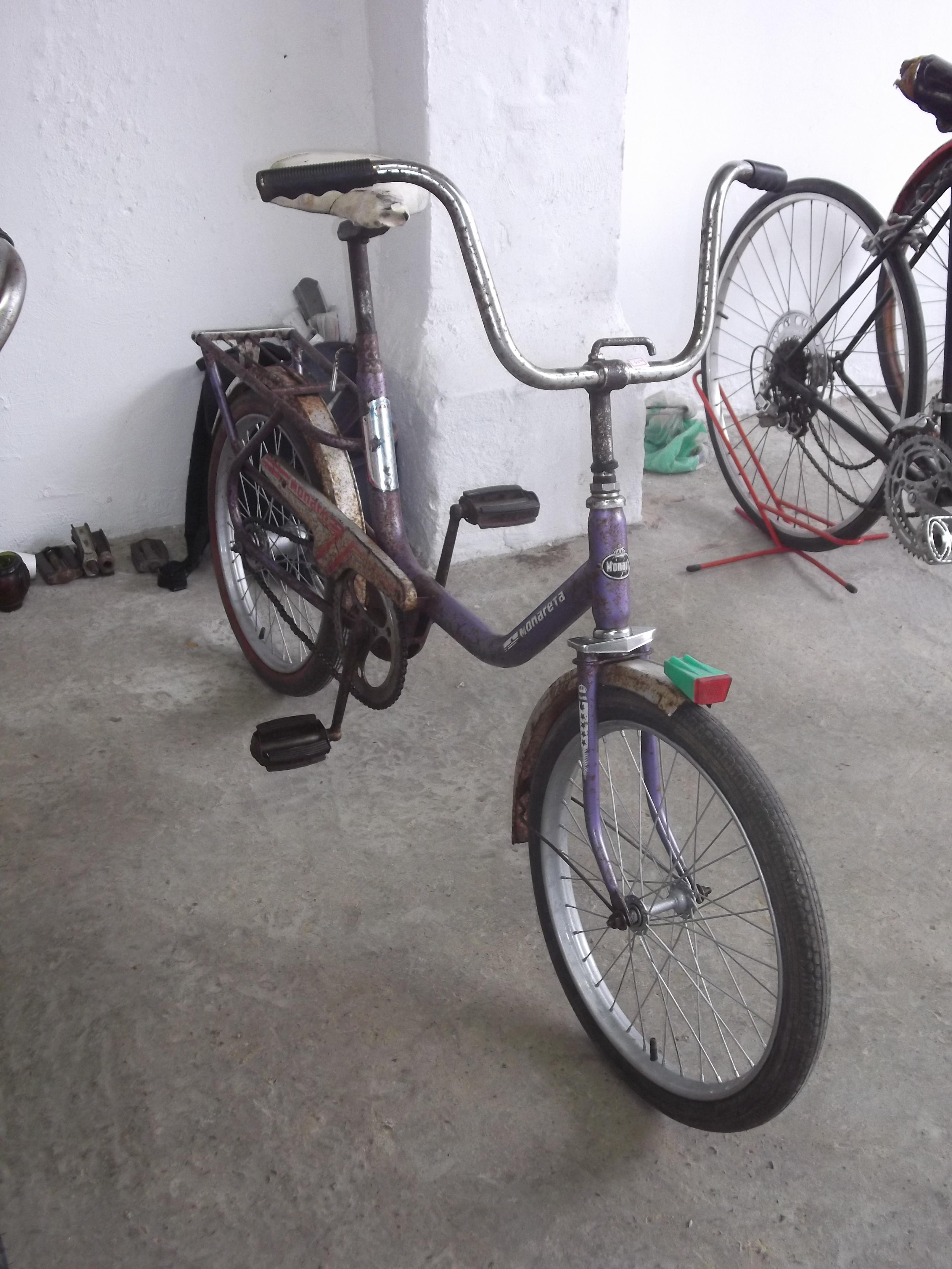 Bike in Porto Alegre, 2013-09-15